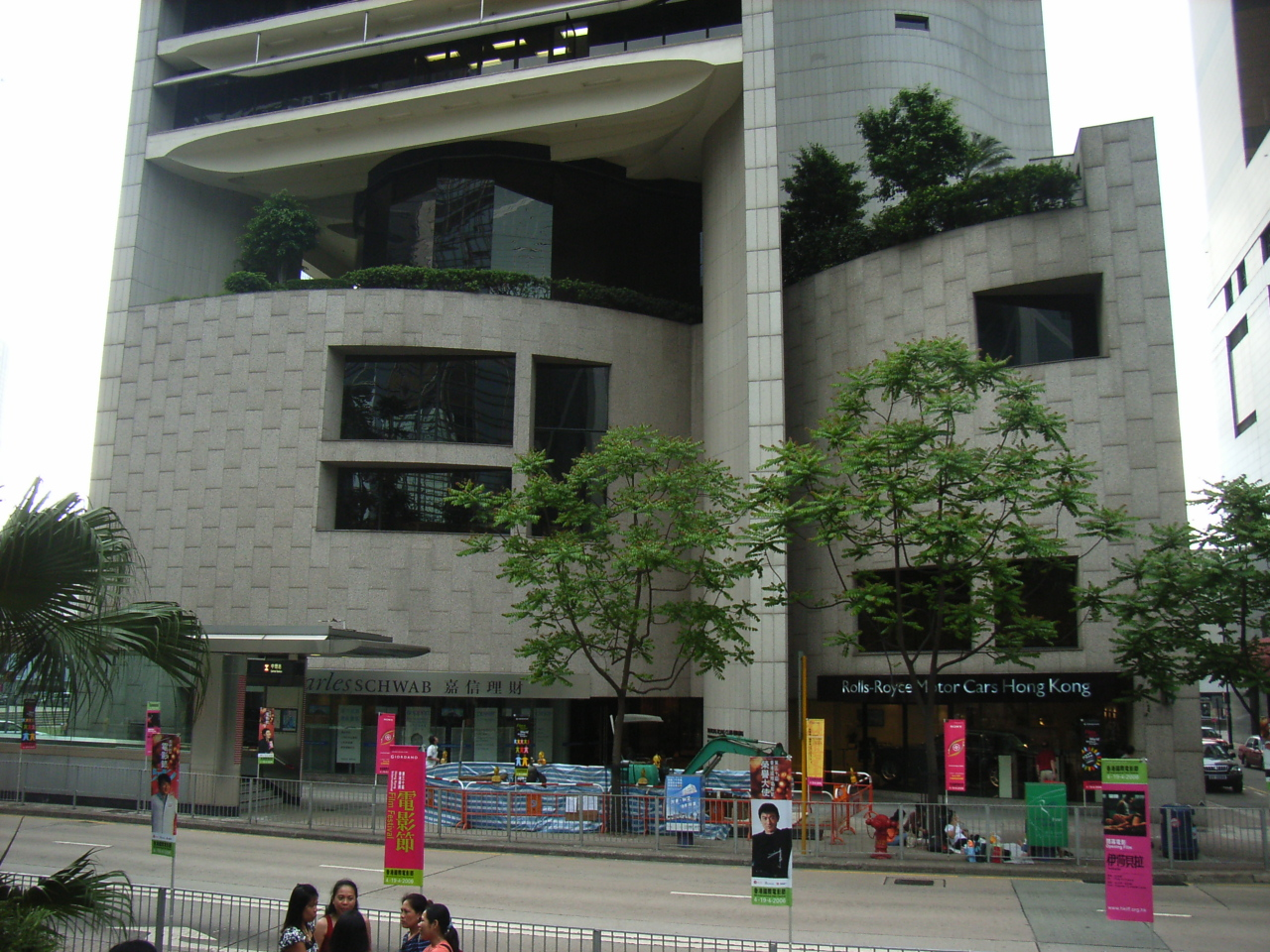 The Hong Kong Club Building, 現在的香港會所大廈在1984年興建，樓高21層